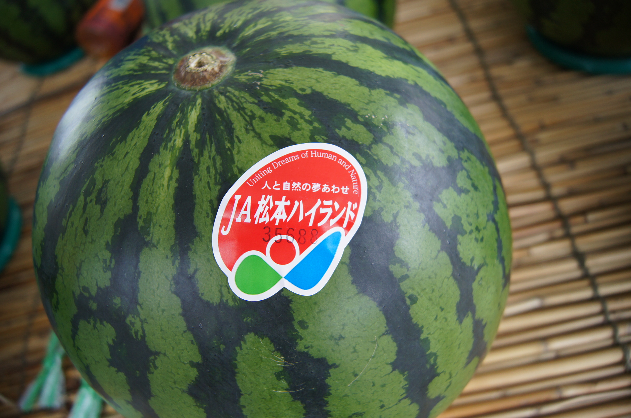 長野県松本市の松本ハイランド農協が出荷する松本ハイランドすいかのラベル